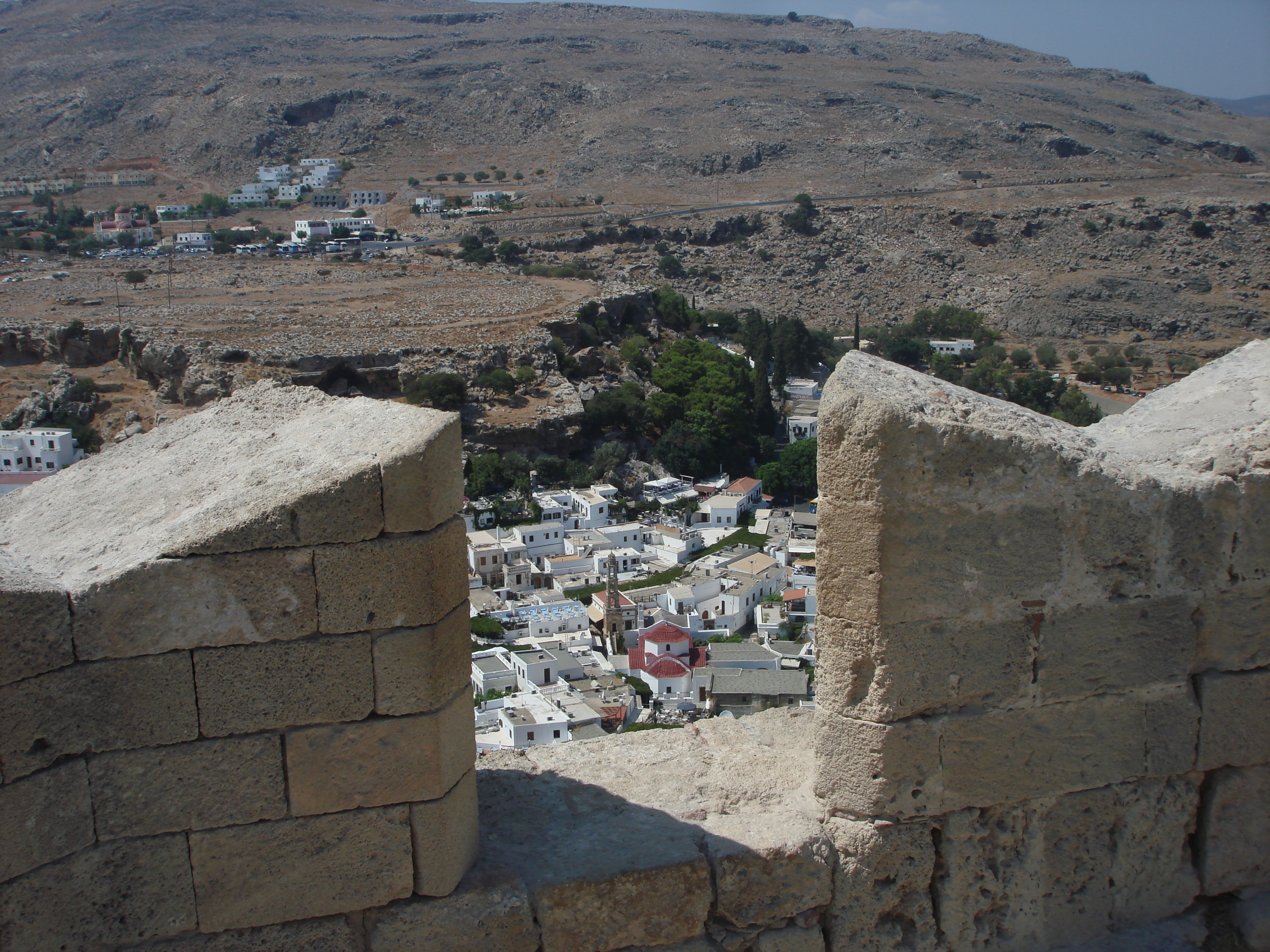 Lindos, widok z Akropolu